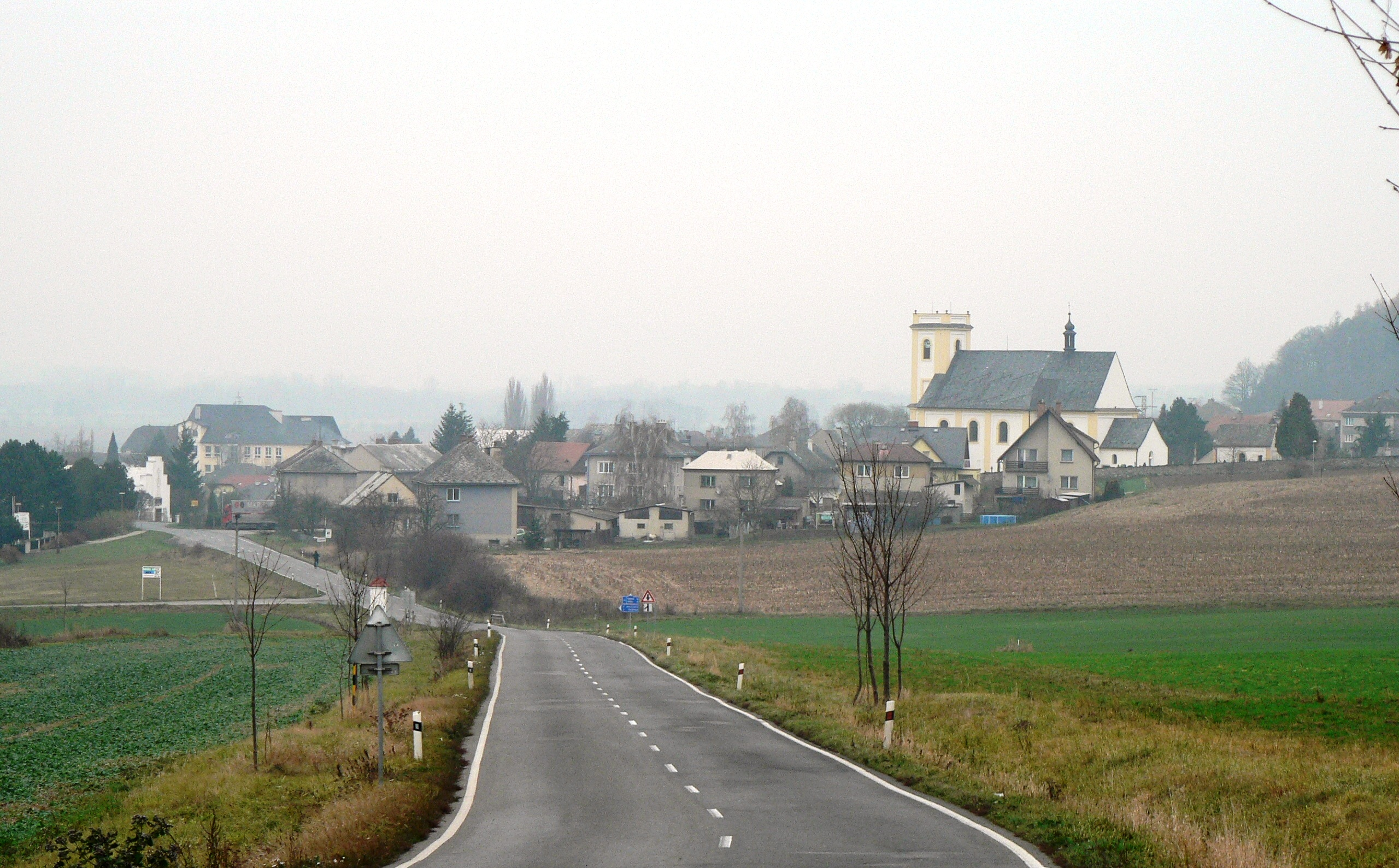 Dubicko, pohled z jihu